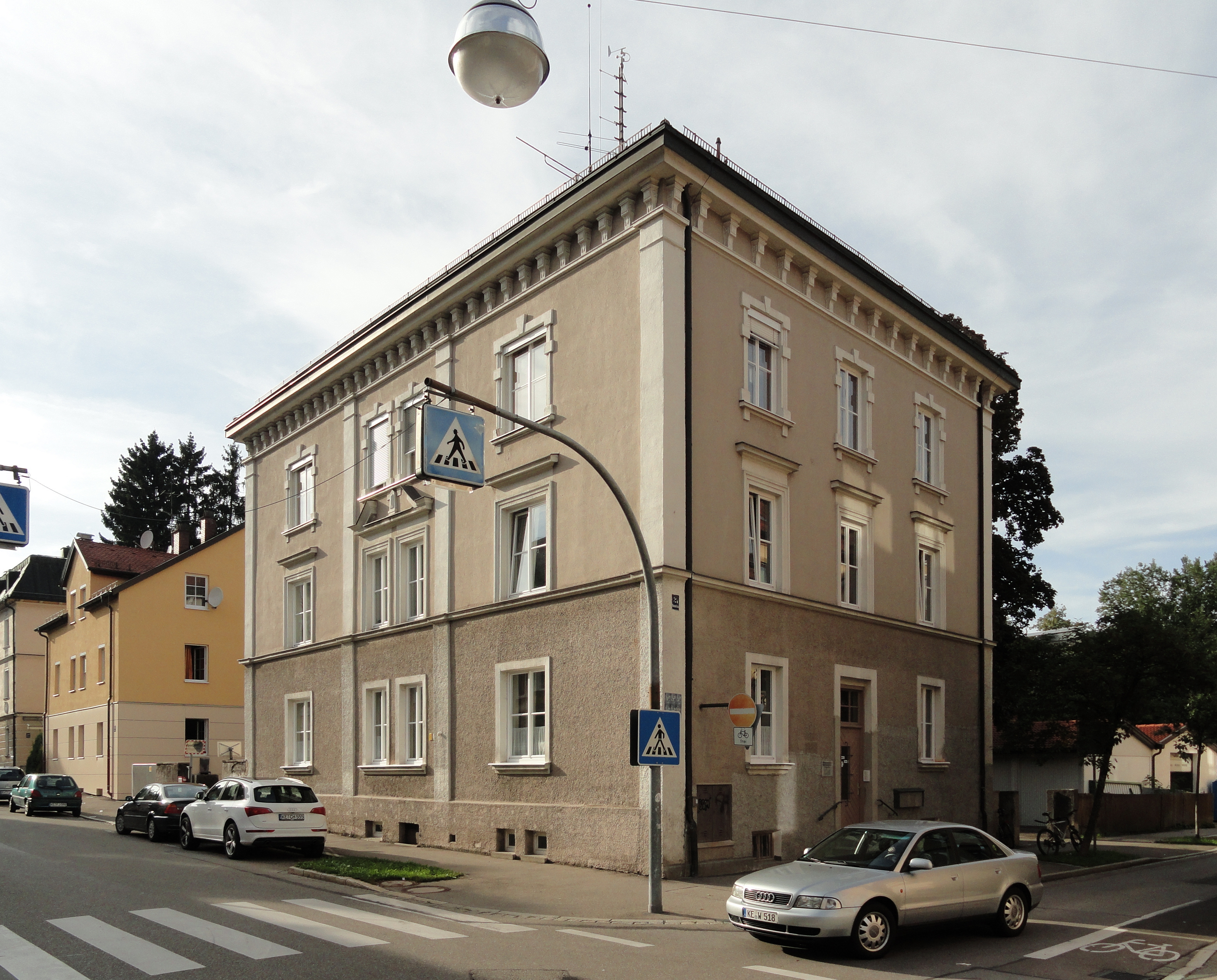 Sitz des Heimatbundes Allgäu